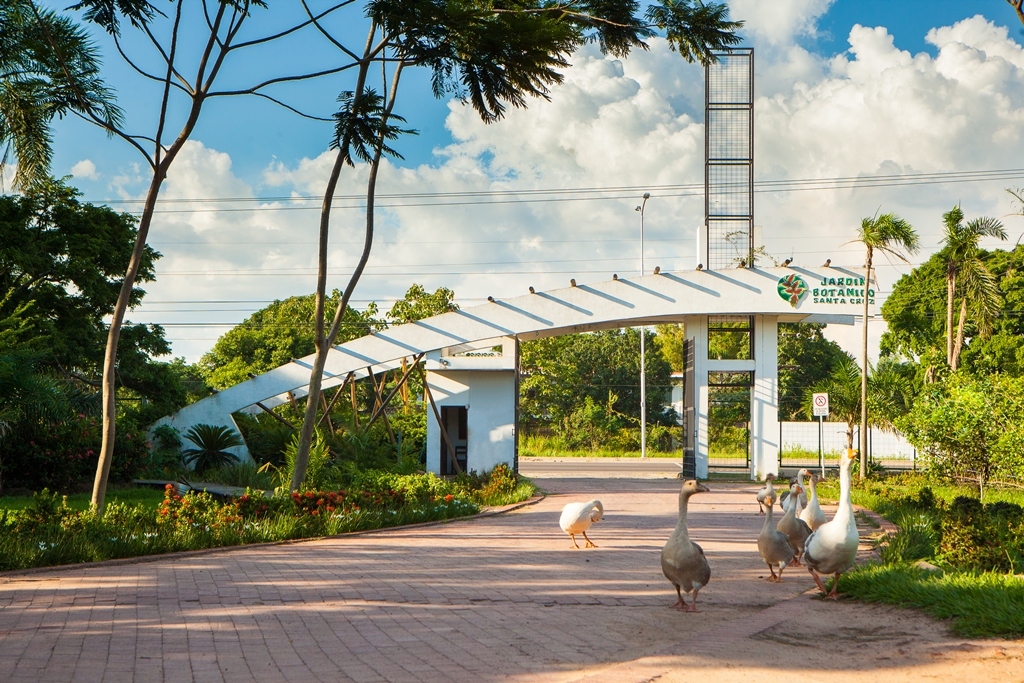 Pórtico del Jardín Botánico Municipal de Santa Cruz de la Sierra